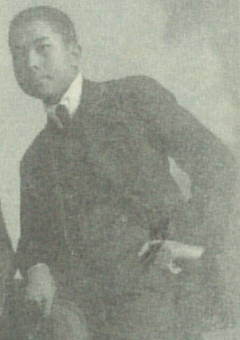 Hitoshi Muraoka (村岡斎, Japanese, †1923)